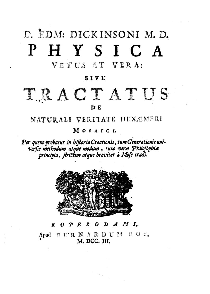 Frontespizio